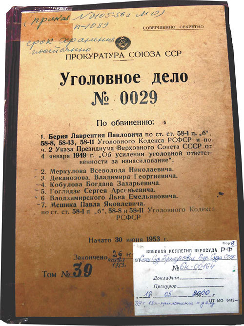 Lavrenti Beria ja kaassüüdistatavate kriminaalasi